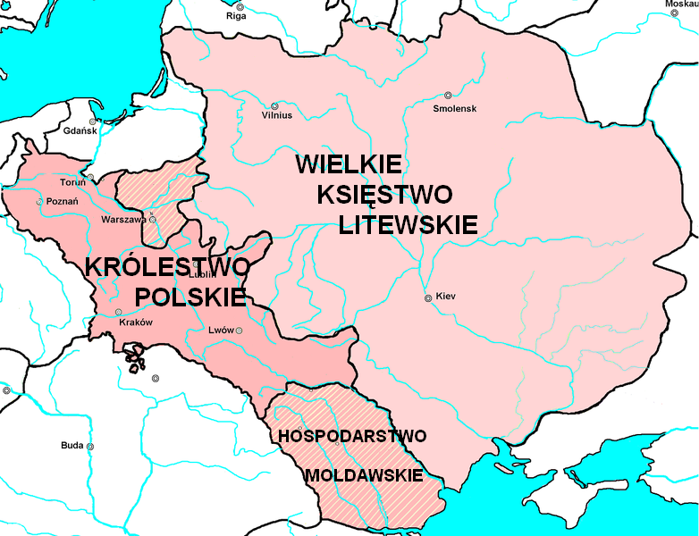 Mapka ukazująca państwa pod rządami Jagiellonów w 1490 roku i ich lenna.